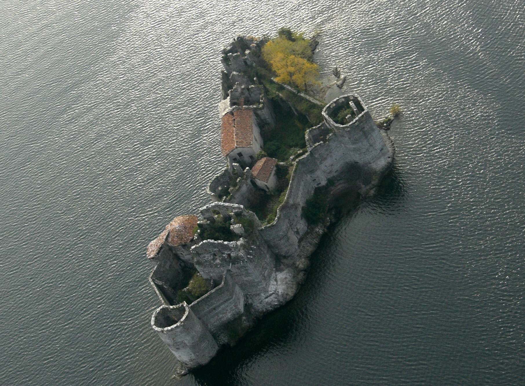 Castelli di Cannero